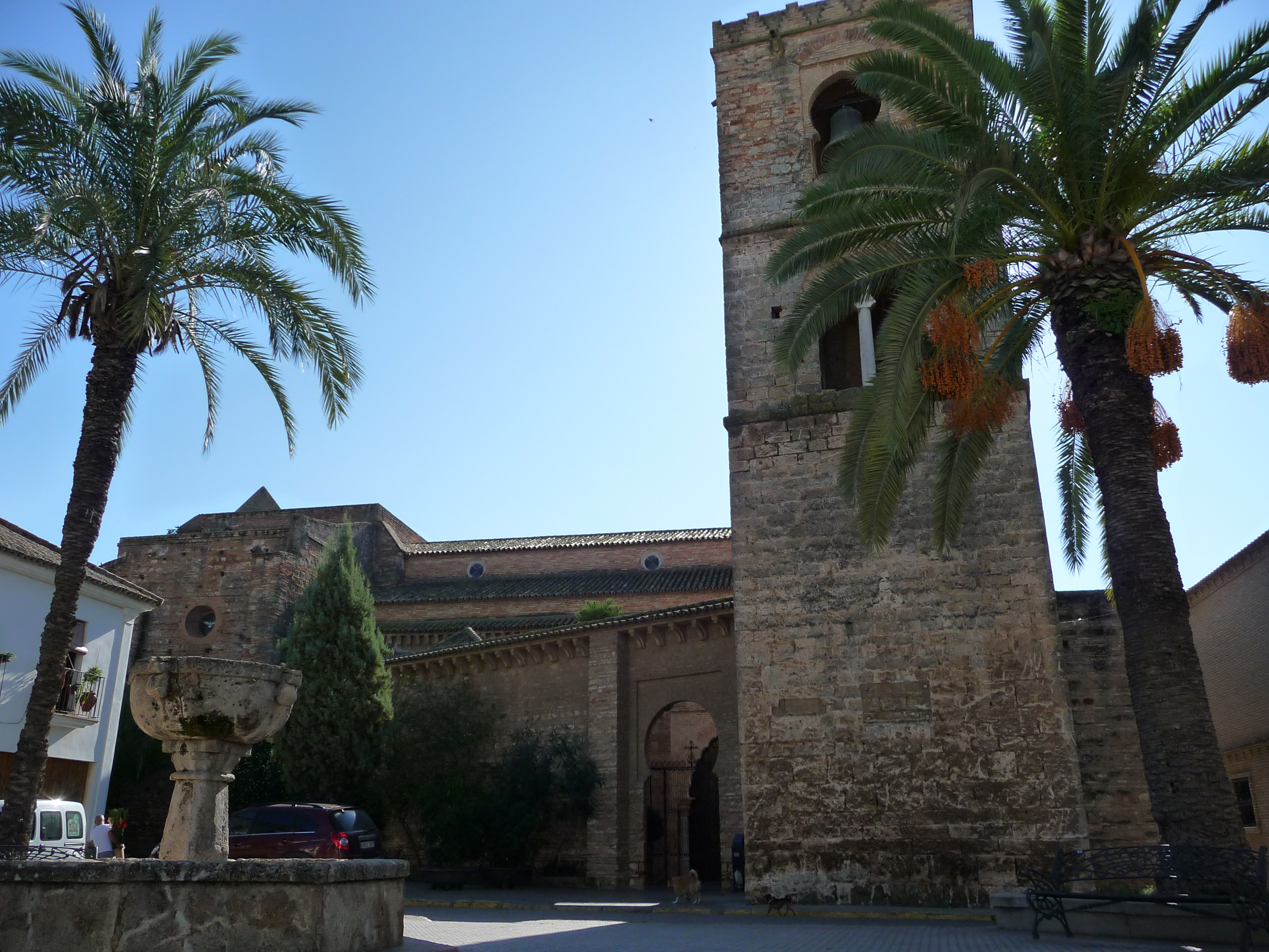 Iglesia de Nuestra Señora de la Granada. Niebla, provincia de Huelva (España)